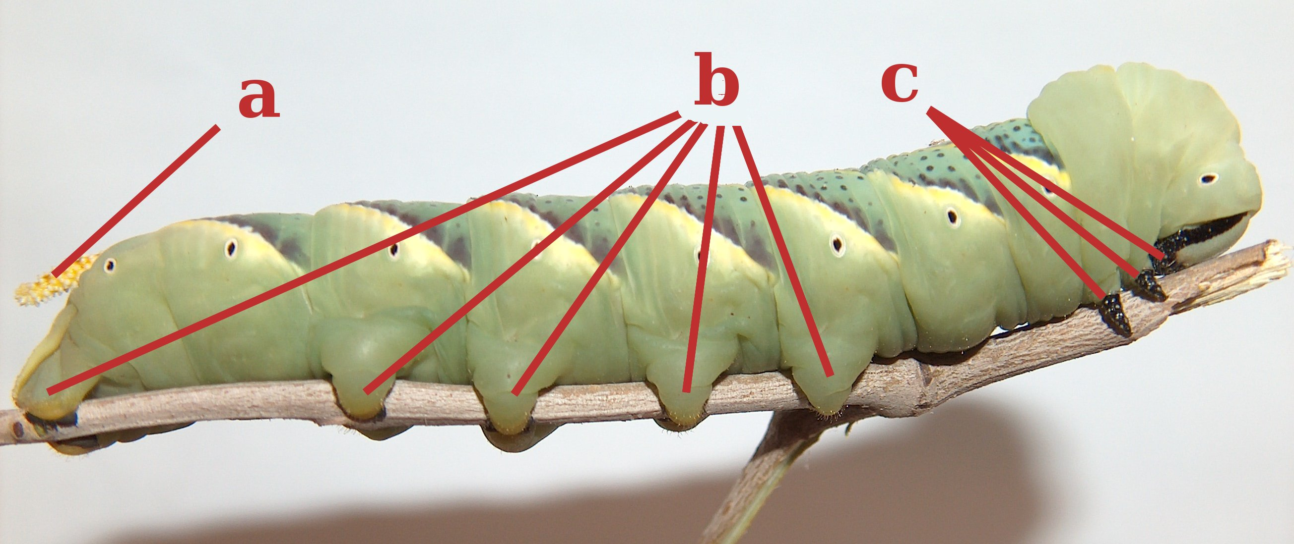 see legend below